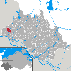 Gresse in Mecklenburg-Vorpommern - district Ludwigslust